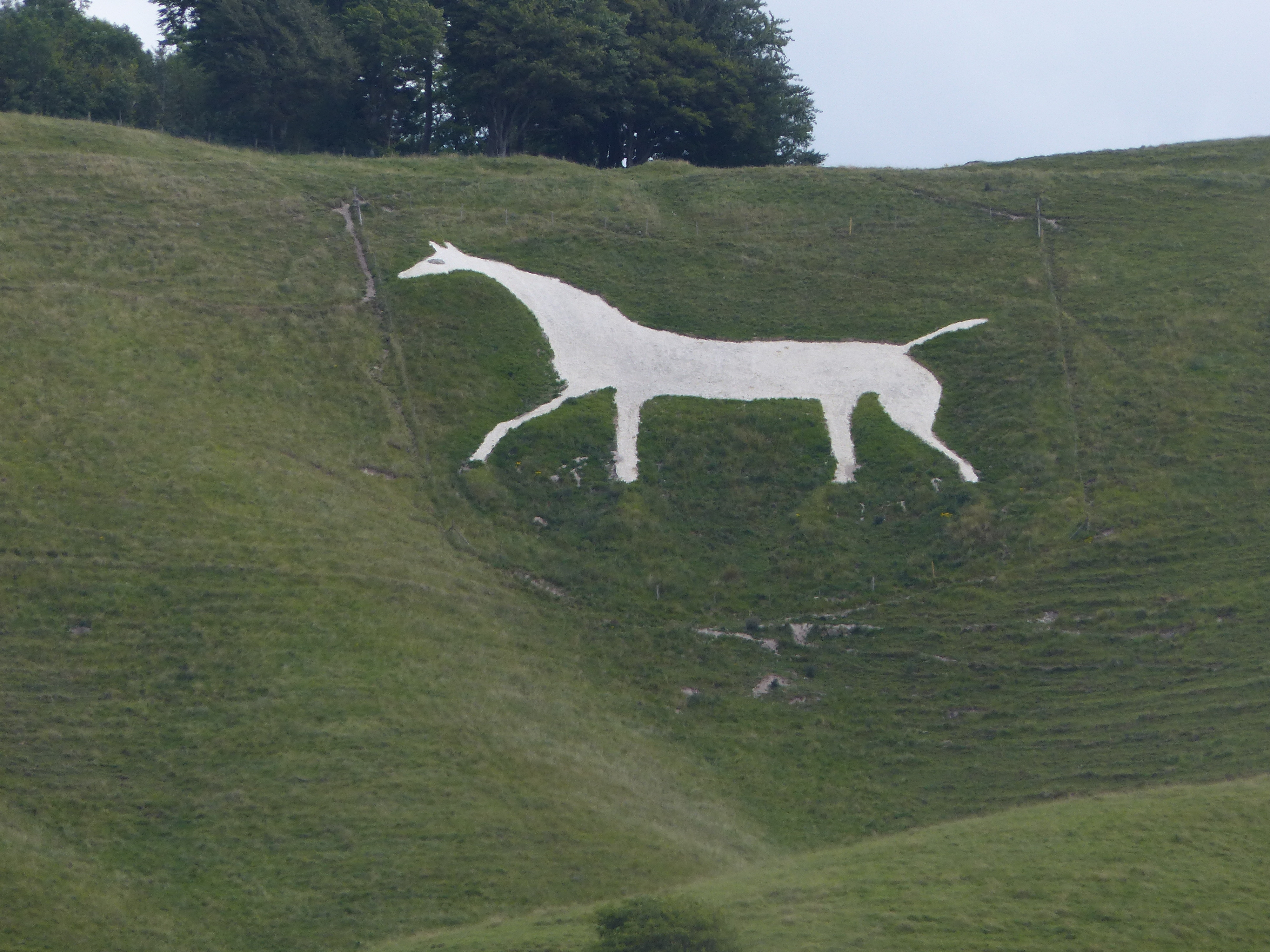 Scharrbild in Kreideuntergrund. The Cherhill White Horse, (Not Westbury White Horse. Richard Avery (talk) 15:51, 4 November 2015 (UTC)